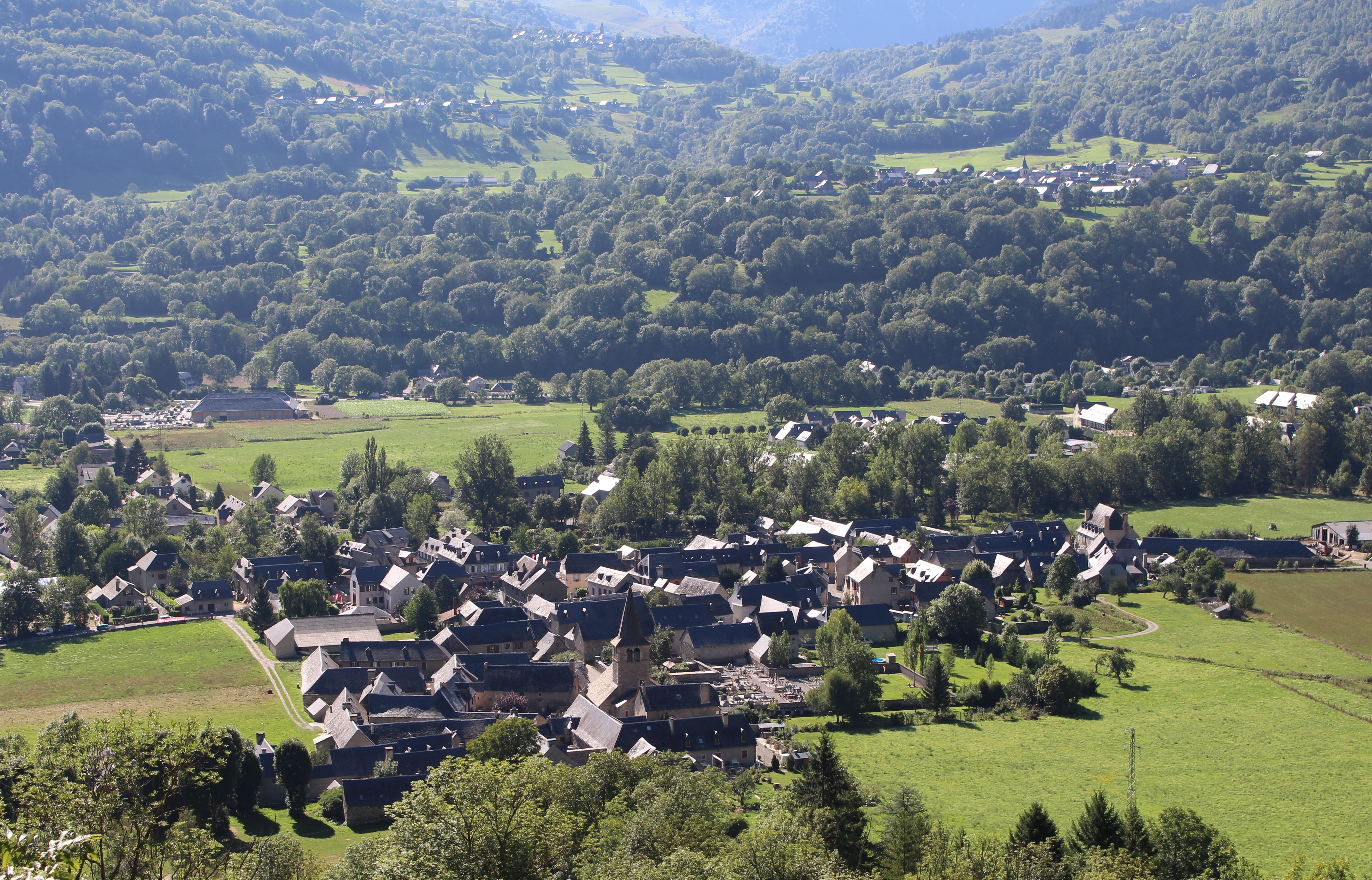 Vielle-Aure (Hautes-Pyrénées)